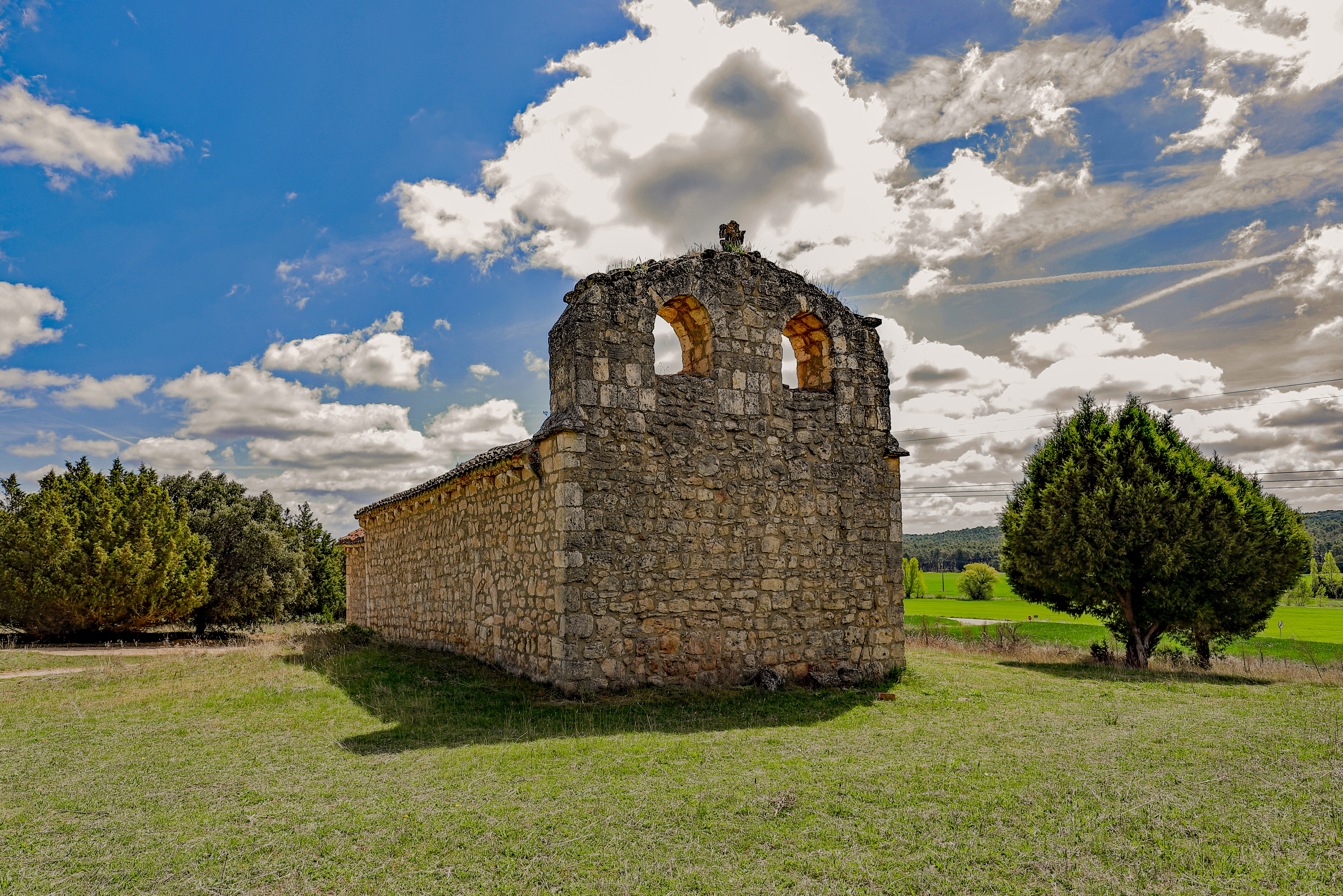 Baños de Valdearados es un municipio de la comarca Ribera de Duero, en la provincia de Burgos.